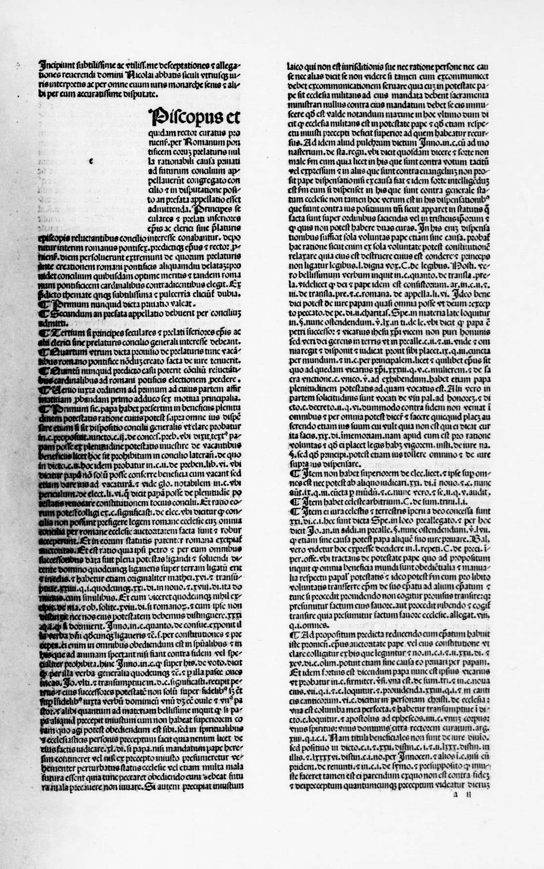 carta a1r